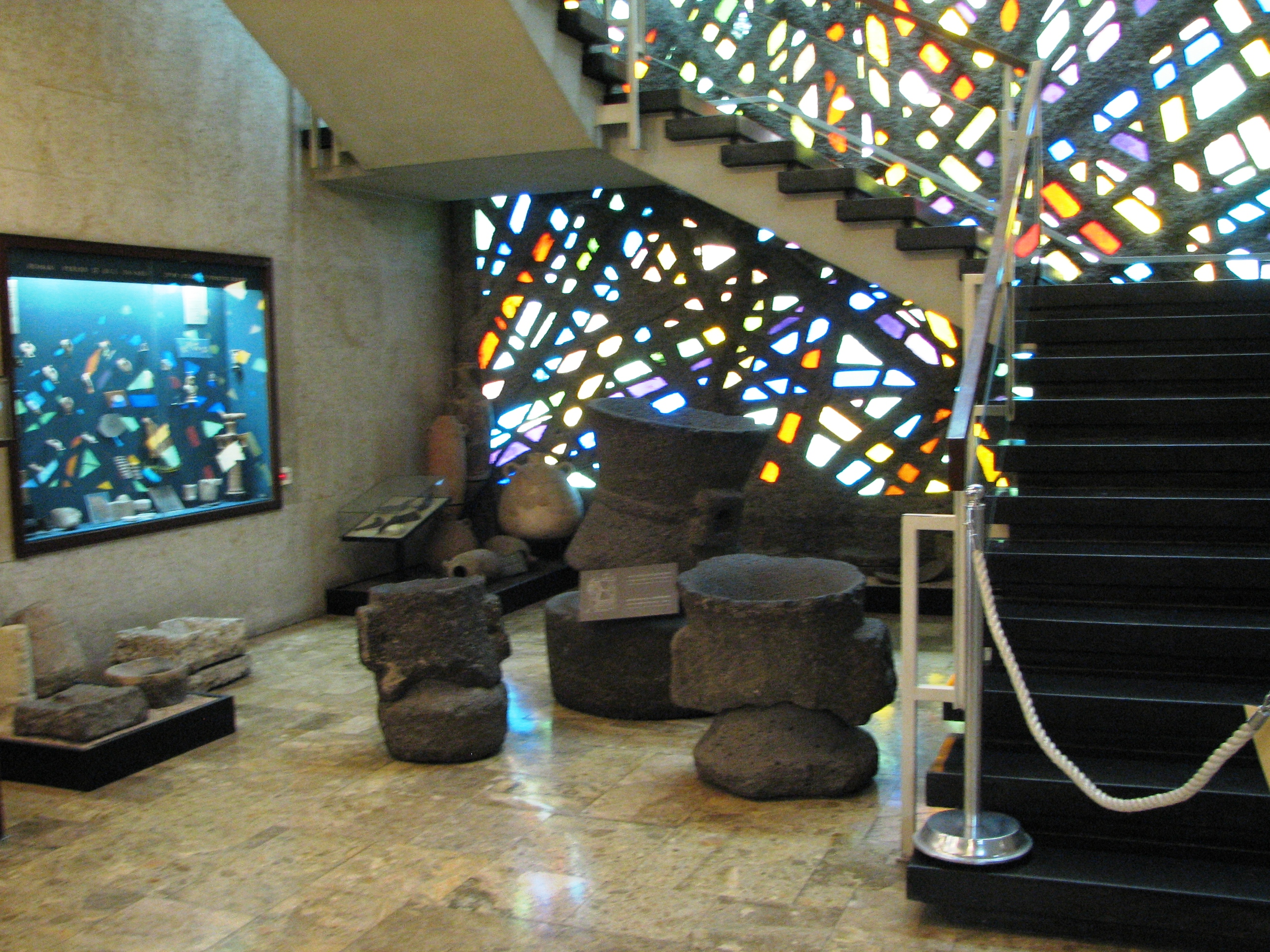 Dagon Museum, Downtown, Haifa, Israel The Museum is dedicated to the history of grain products מוזיאון דגון בעיר התחתית בחיפה שוכן במבנה המשרדים של ממגורות דגון. המוזיאון מוקדש לתולדות הדגן ומוצריו, וכלל ממצאים ארכאולוגים הקשורים בנושא וכן דגמים של מתקנים שונים בהם משתמשים בממגורות דגון מתקני טחינת קמח מבזלת מצפון ארץ ישראל מהתקופה הרומית בין 37 לפנה"ס ועד 324 לספירה